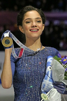 Евгения Медведева на подиуме